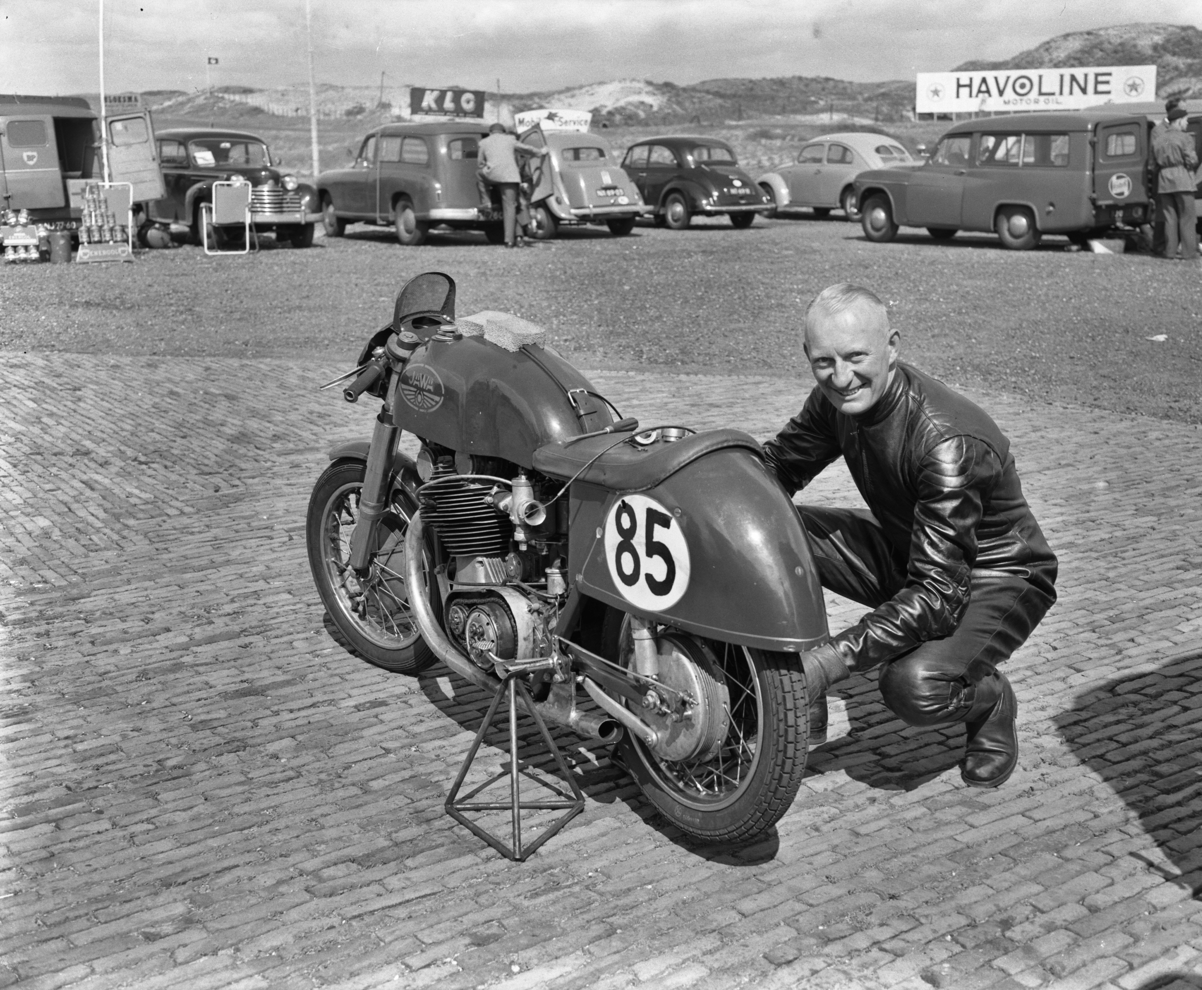 Collectie / Archief : Fotocollectie Anefo Reportage / Serie : [ onbekend ] Beschrijving : Training motorraces Zandvoort, Drikus Veer weer bij zijn Jama Datum : 20 mei 1955 Locatie : Noord-Holland, Zandvoort Trefwoorden : motorraces Persoonsnaam : Veer, D. Fotograaf : Pot, Harry / Anefo, [onbekend] Auteursrechthebbende : Nationaal Archief Materiaalsoort : Negatief (zwart/wit) Nummer archiefinventaris : bekijk toegang 2.24.01.04 Bestanddeelnummer : 907-1493